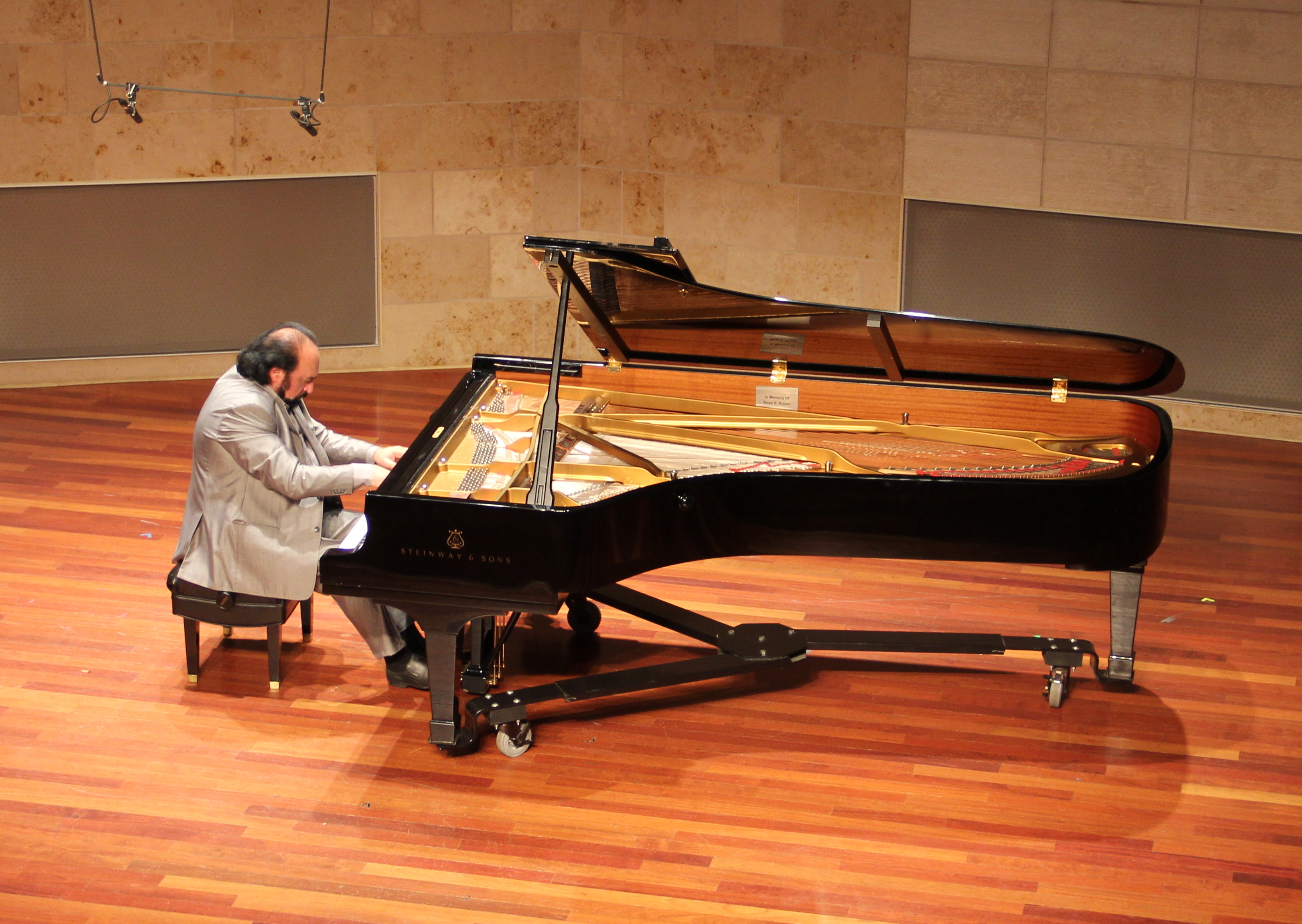 Sergey Musaelyan's recital in San Francisco Conservatory of music